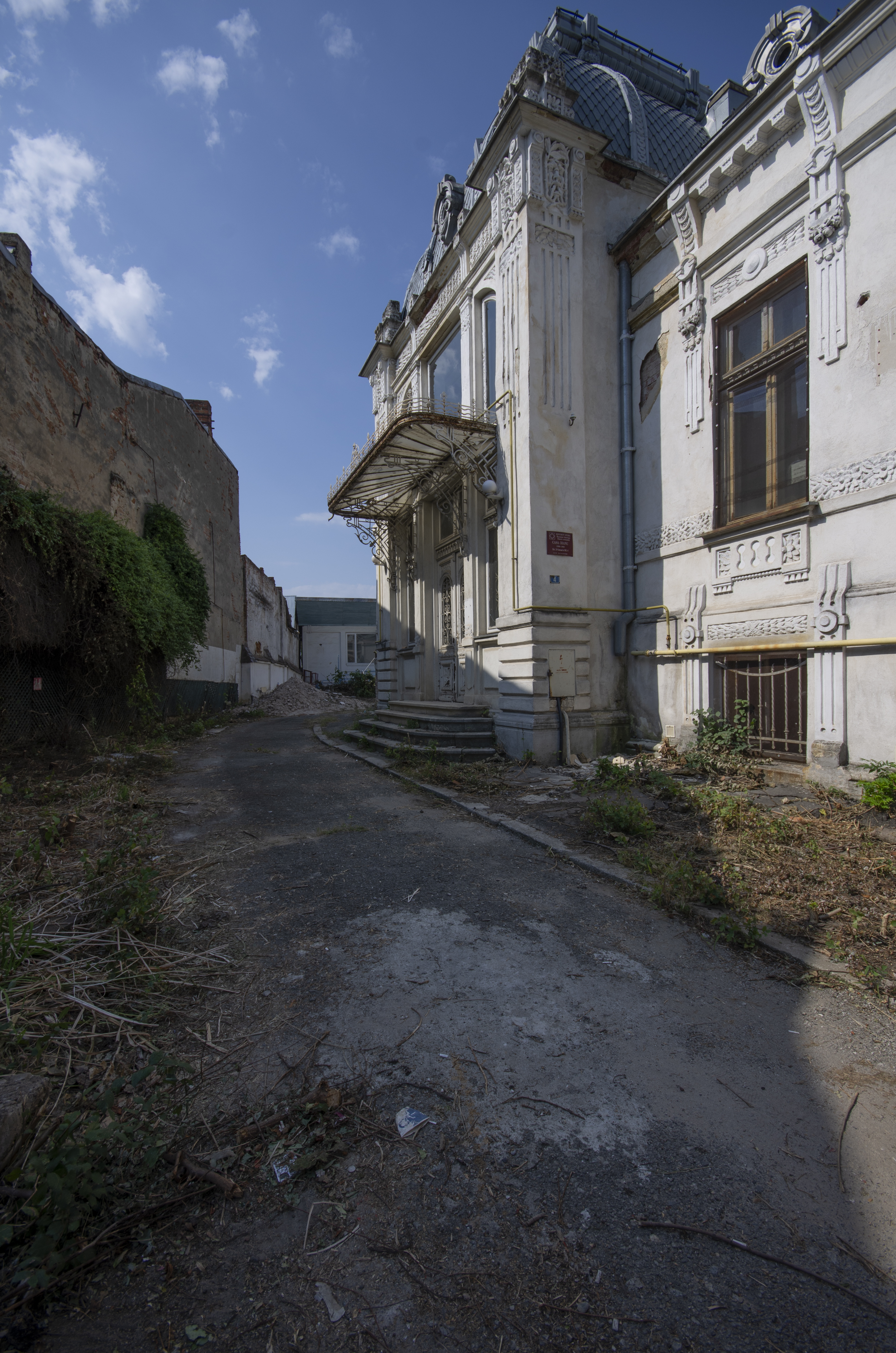 Intrarea principala a Casei Dianu, Craiova, 1900